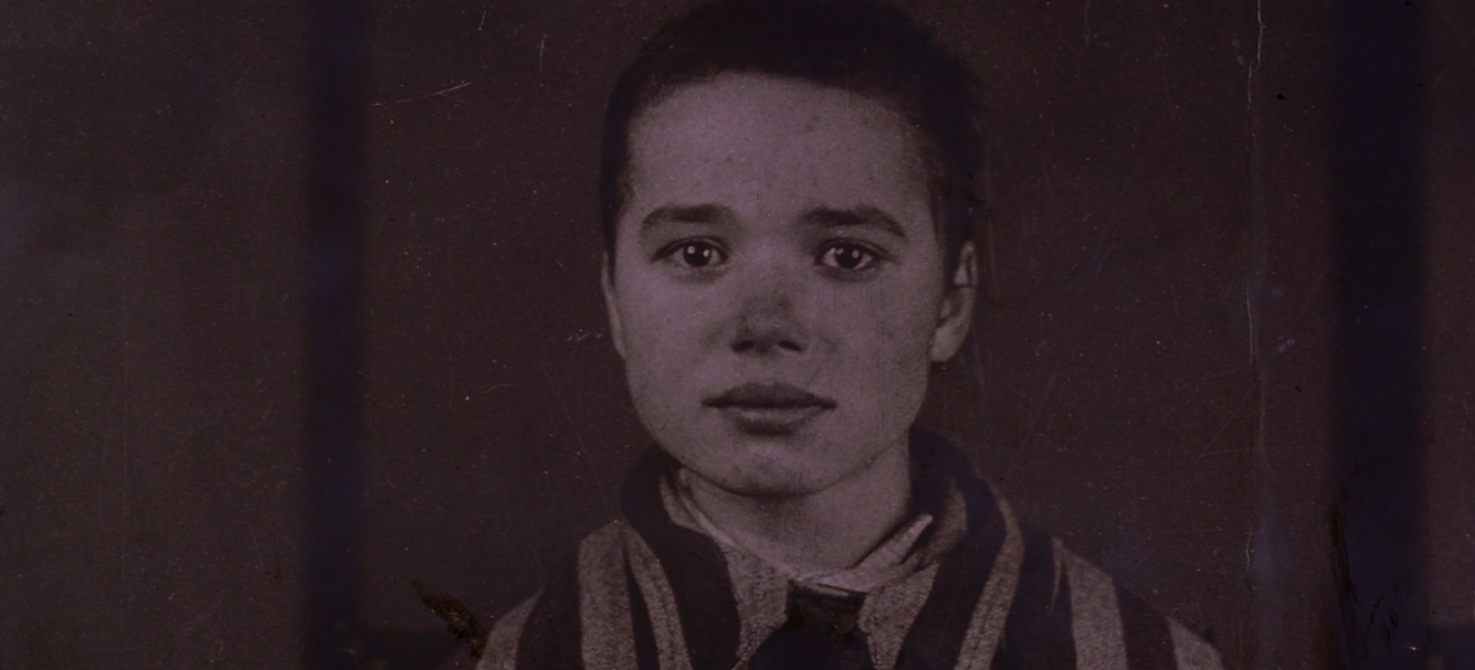 ഓഷ്വിറ്റ്സ് കോൺസെൻട്രേഷൻ ക്യാമ്പ്